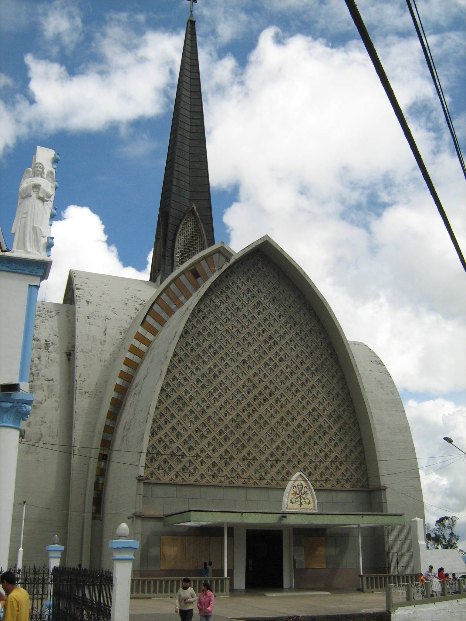 Basílica Menor de Nuestra Señora de las Misericordias en el Municipio de Santa Rosa de Osos, Antioquia. Colombia.